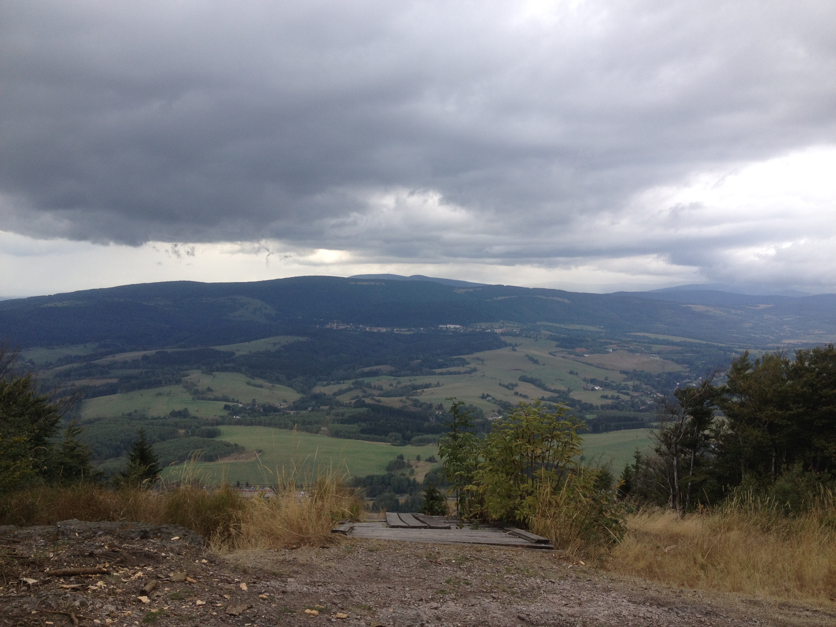 Widok na Wyżynę Broumovską.